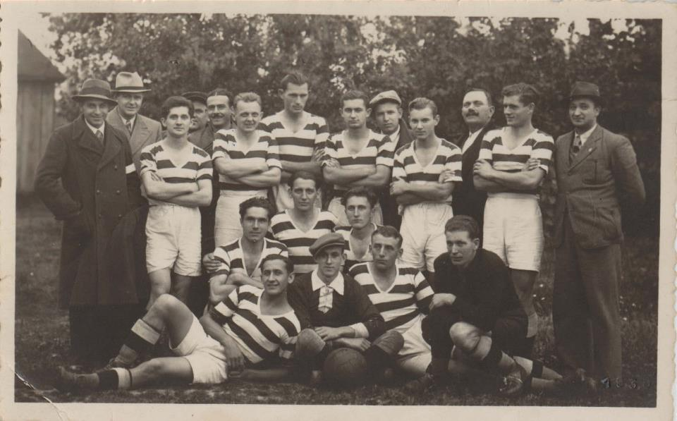 Fotografija momčadi nogometnoga kluba Taninpila Đurđenovac, 1921. godine